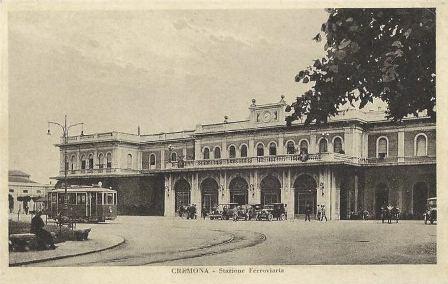 Cremona, stazione con tram